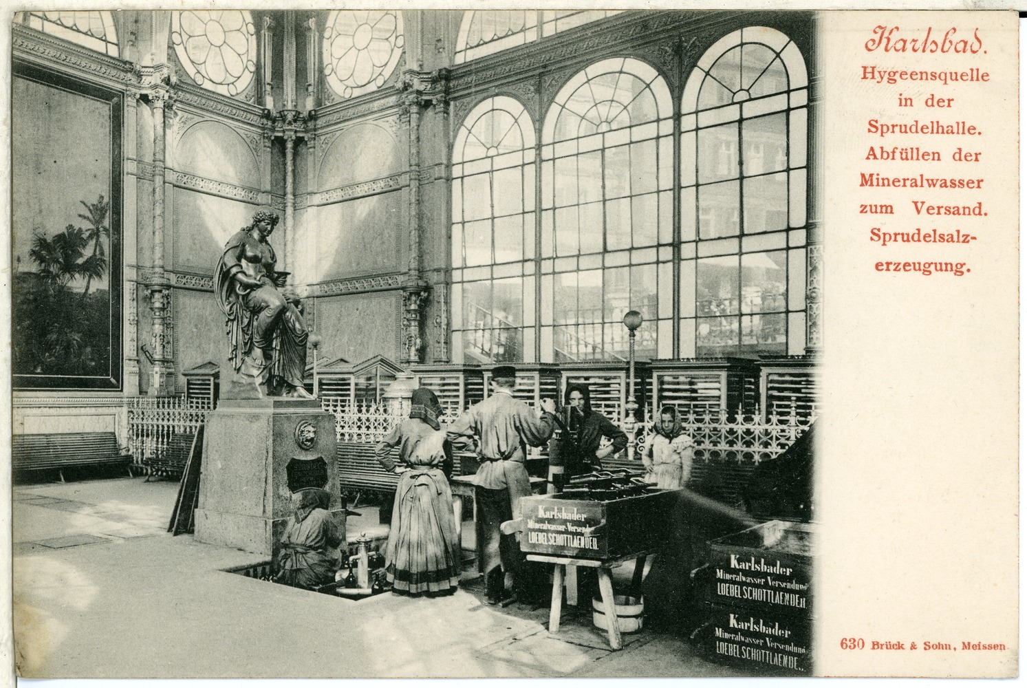 Karlsbad; Hygiensqellen This postcard is from publisher Brück & Sohn in Meißen ( postcard has a unique number 00630 and is available in a higher resolution at the publisher. This images was uploaded in a cooperation project between Wikipedians and the publisher.